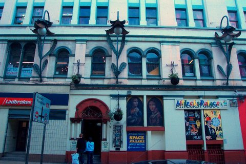 Taken by James Taylor using Kodak DC4800